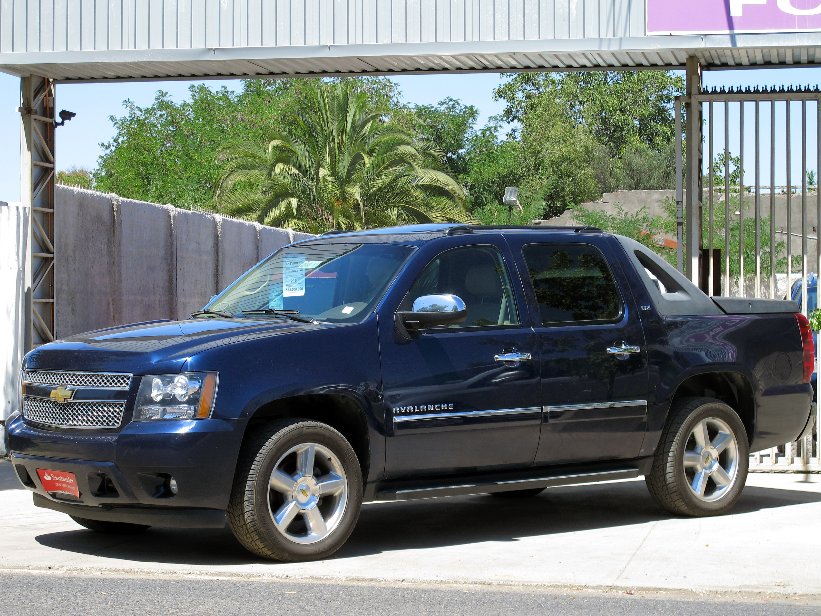 Chevrolet Avalanche LTZ 2011